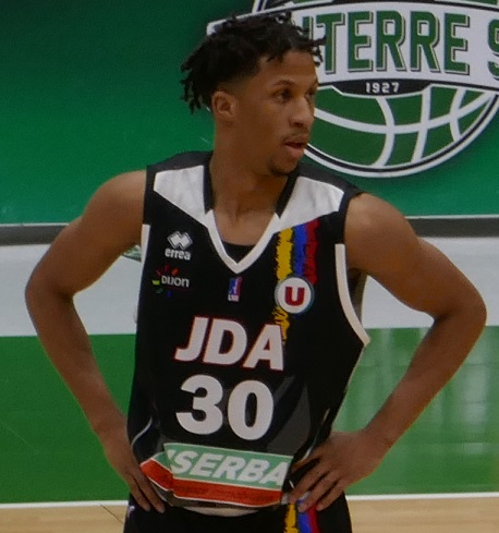 JJ Frazier